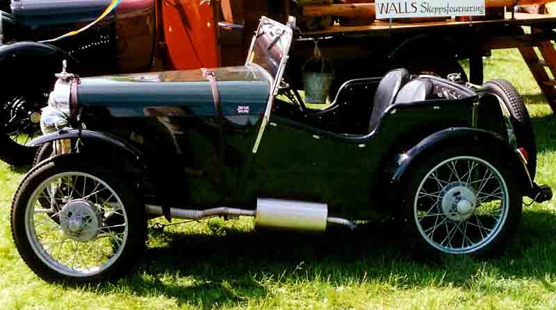 Austin Seven 2-Seater Open 1929